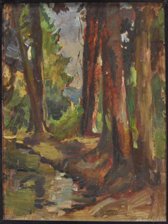 Maria Gross: Partie in der Fasanerie Wiesbaden, 1916, Öl auf Malkarton, 38 x 29 cm, Privatsammlung Wiesbaden.